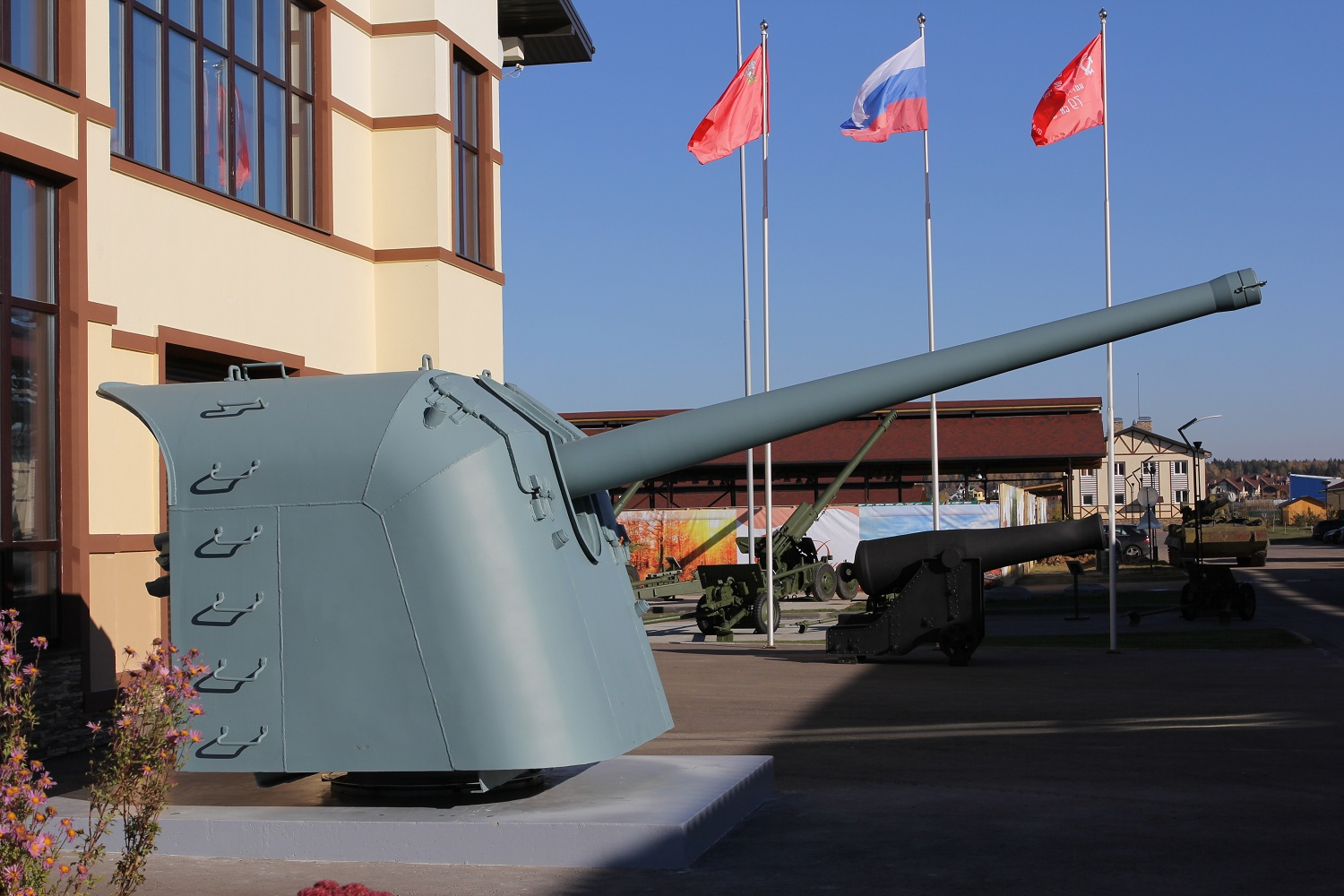 130-мм корабельное орудие образца 1935 г. в Музее отечественной военной истории